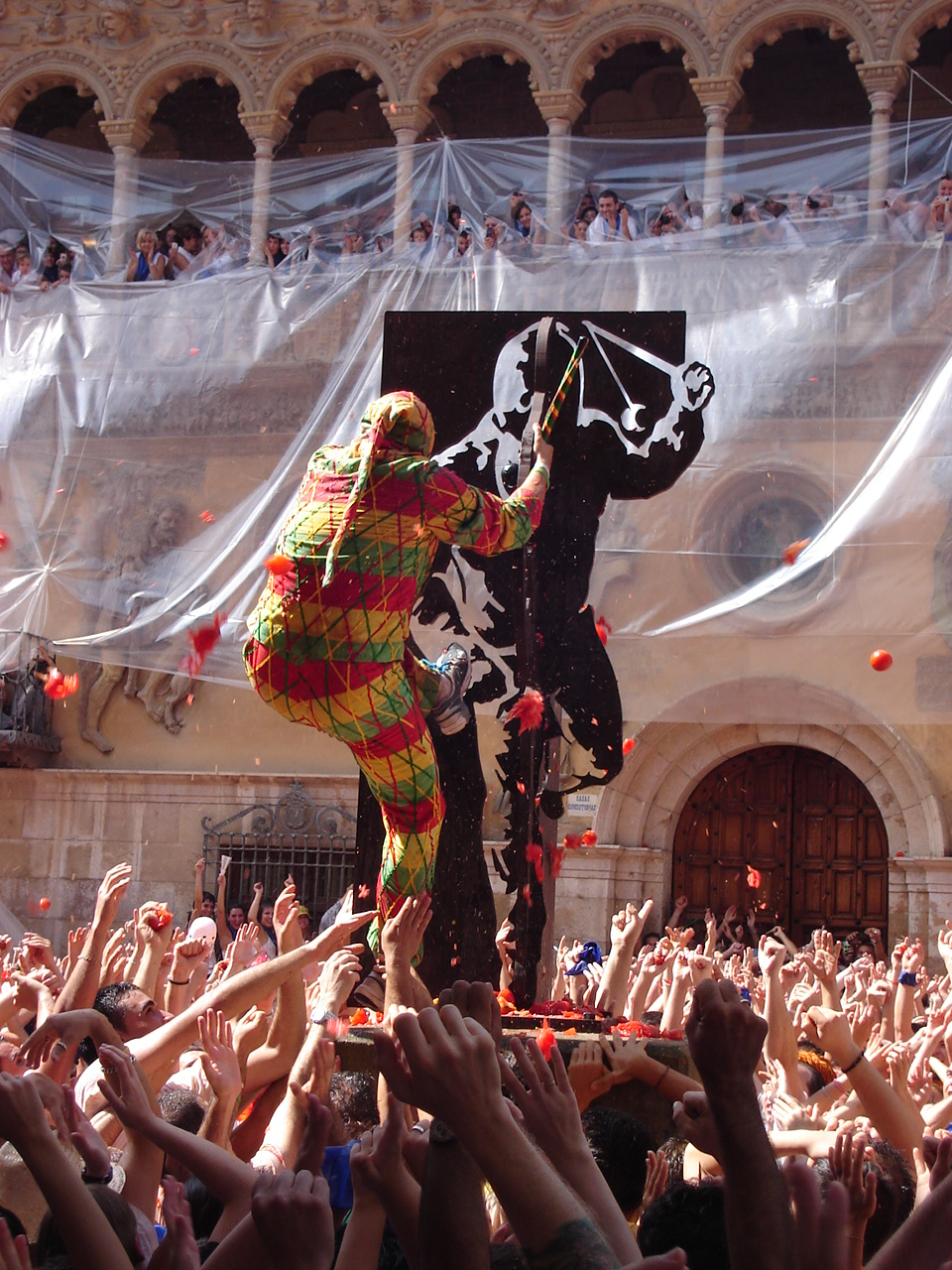 La fiesta del Cipotegato en Tarazona, Aragón, España, 27 de agosto de 2007